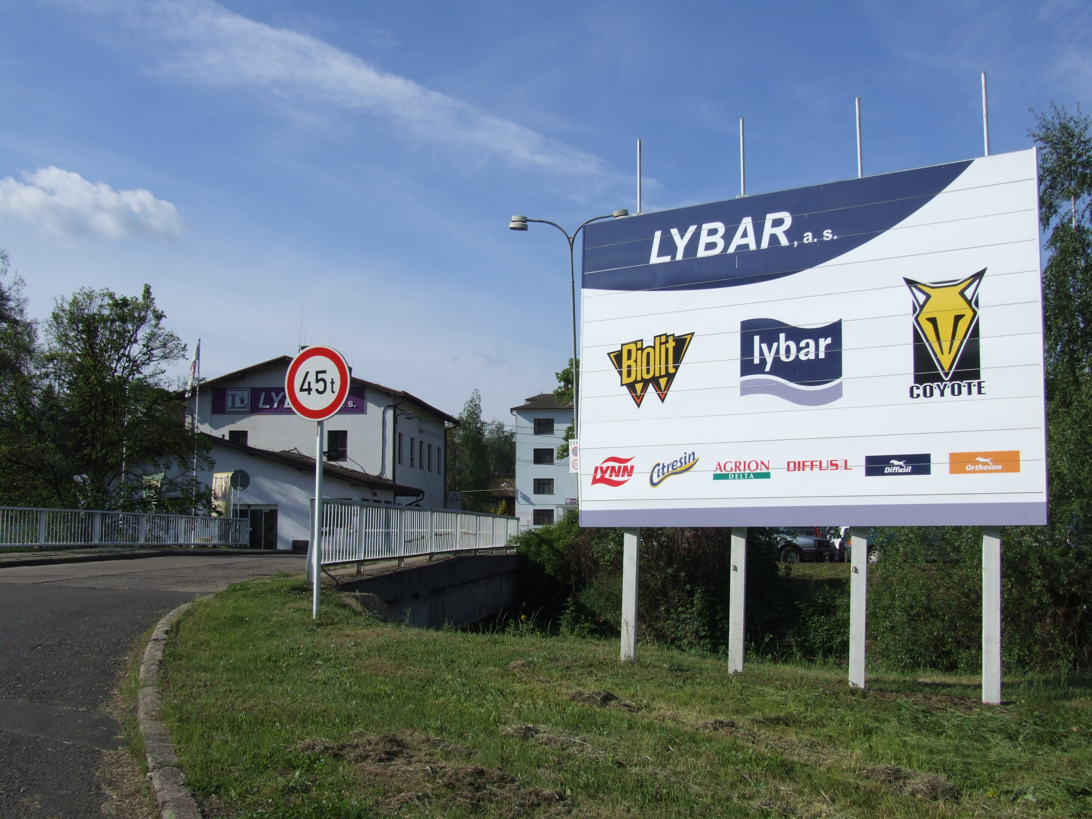 Vstup do firmy Lybar, 2005